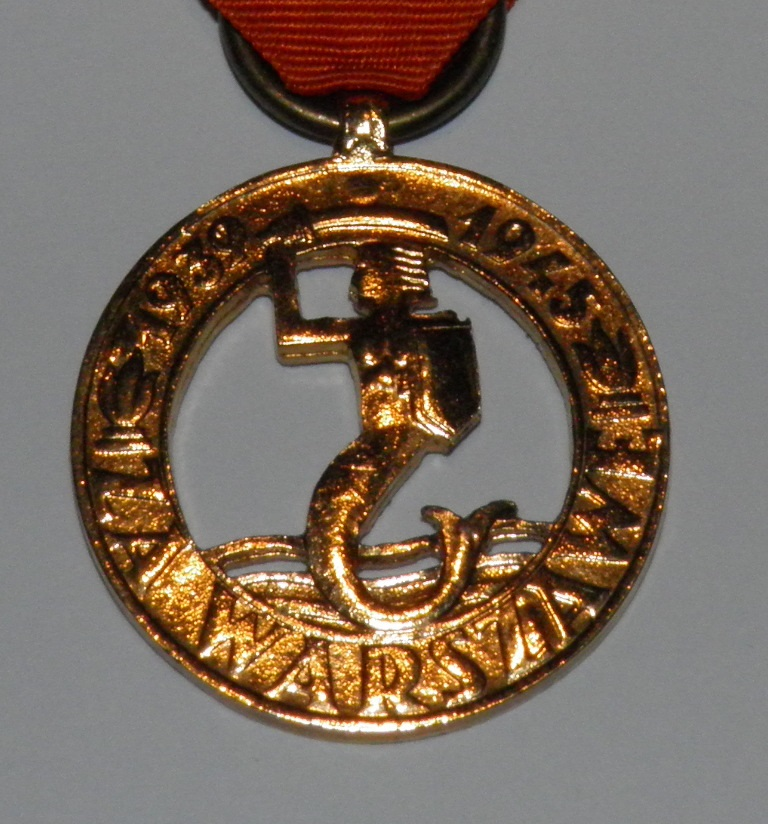 Medal za Warszawę 1939-1945 ażurowa odmiana awers